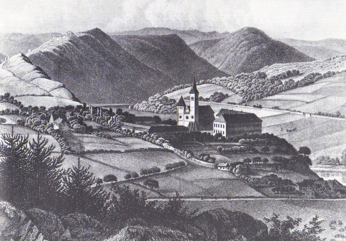 Kloster Merten, Eitorf